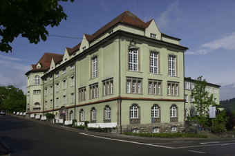 Hauptgebäude der HfG Gmünd